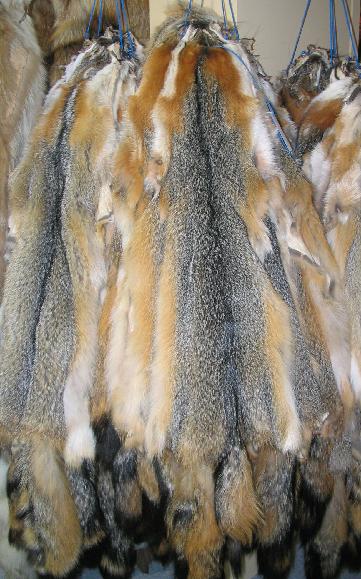 Northamerican Gray-Fox Fur skins / Grisfuchsfelle auf der Pelzmesse Mifur in Mailand.